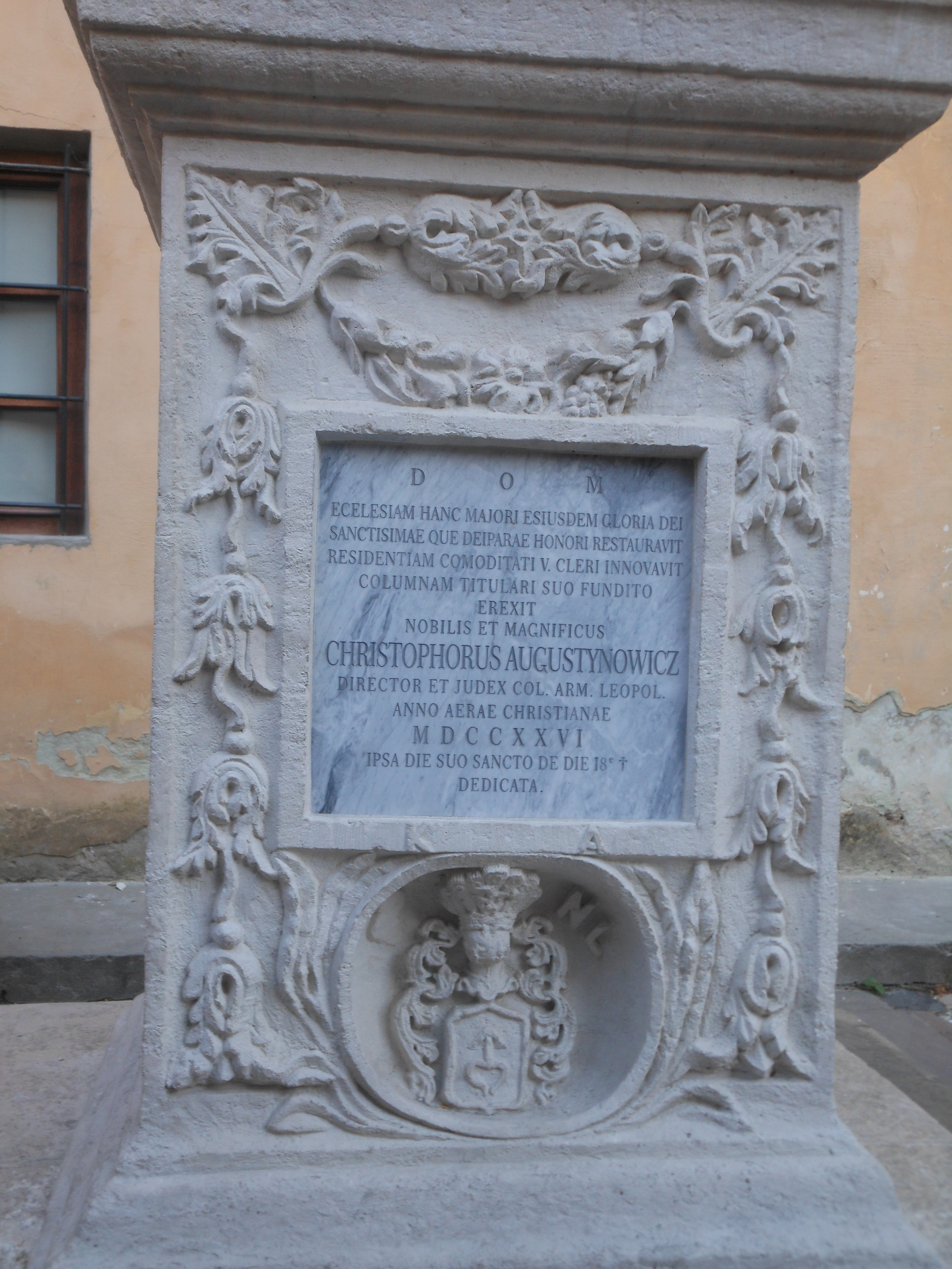 Вірменський собор — Колона Святого Христофора, Львів, вул. Вірменська, 7/9